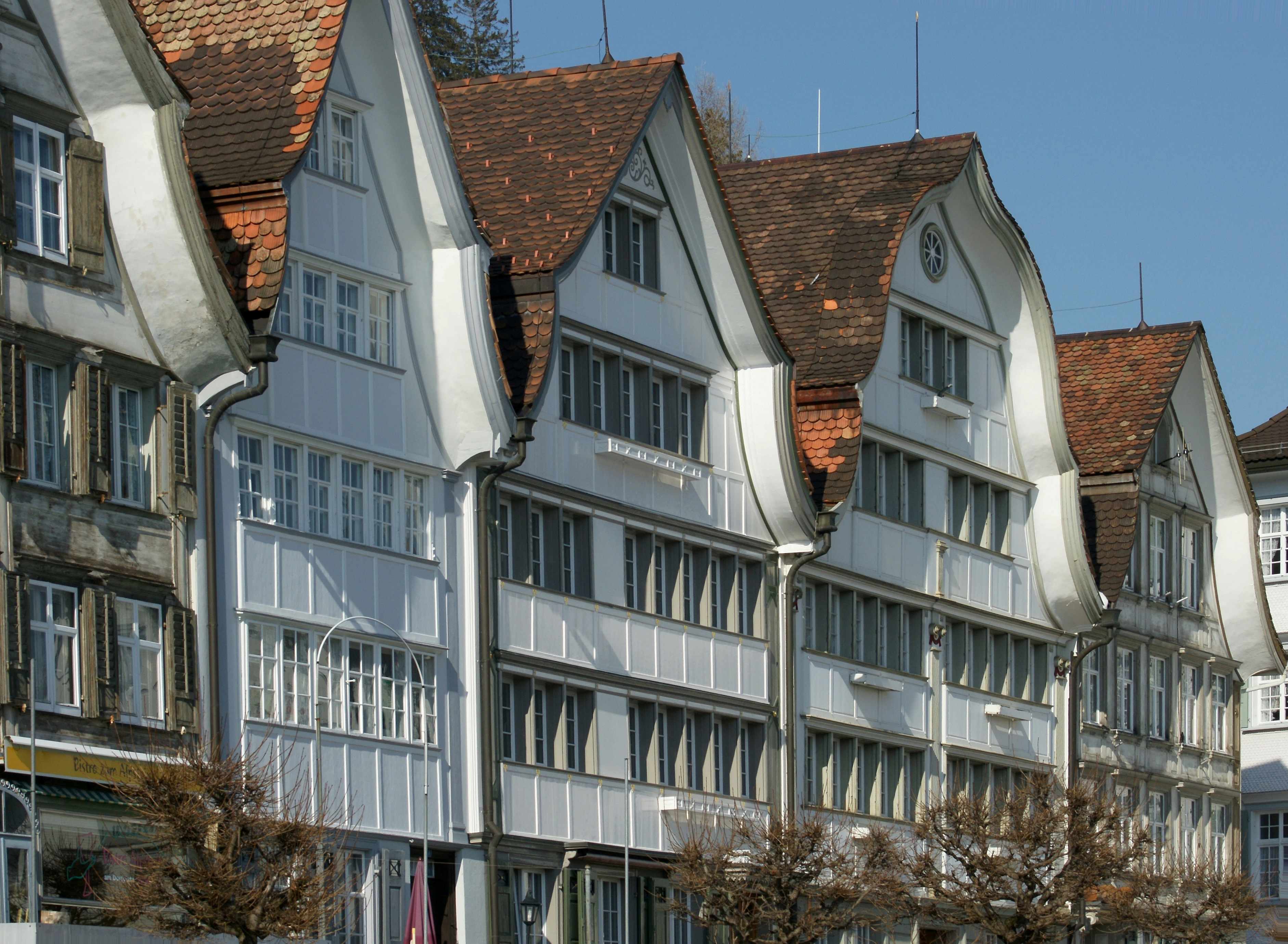 Häuserzeile am Dorfplatz in Gais.